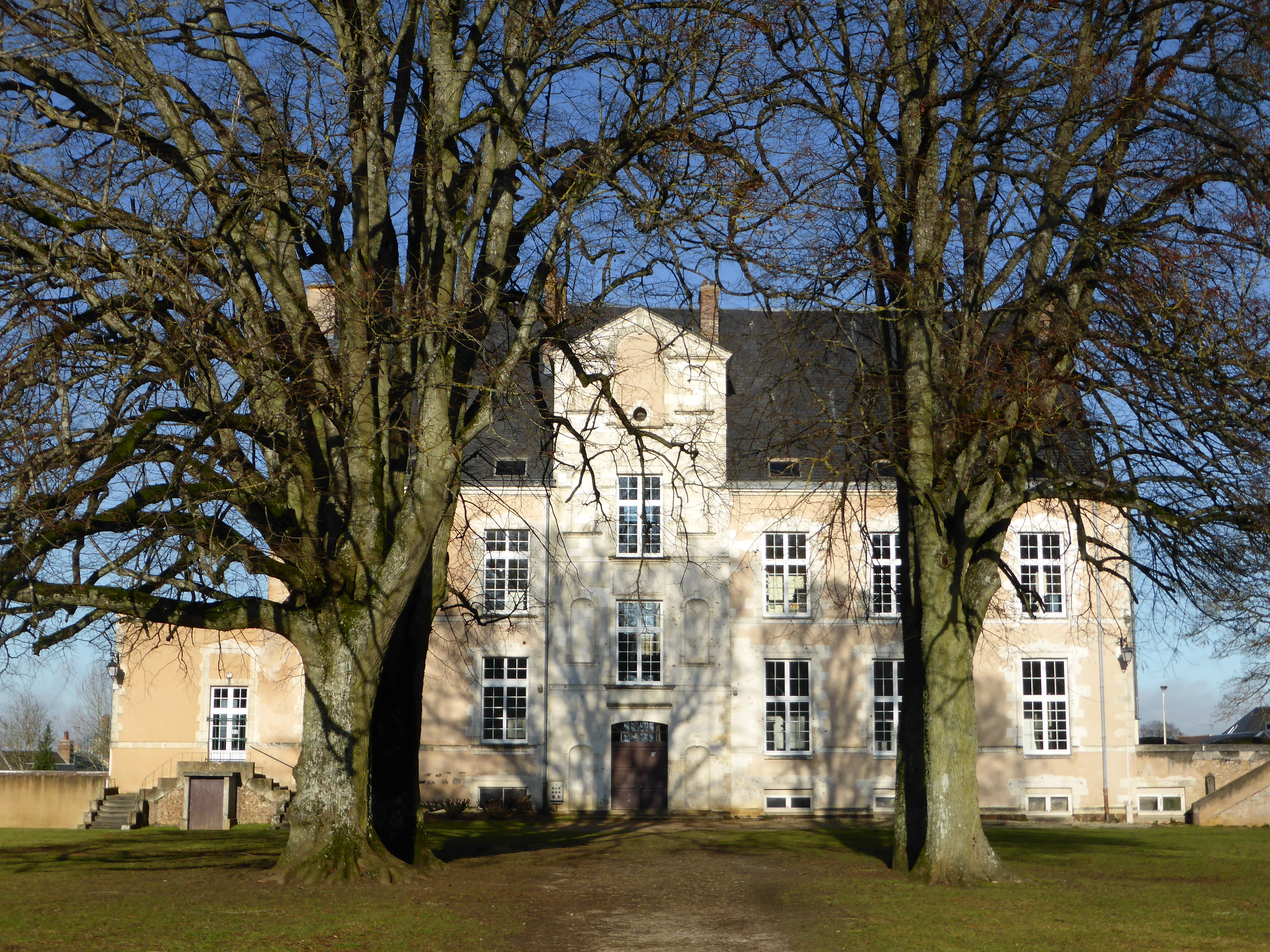 Château de La Loupe, en Eure-et-Loir.